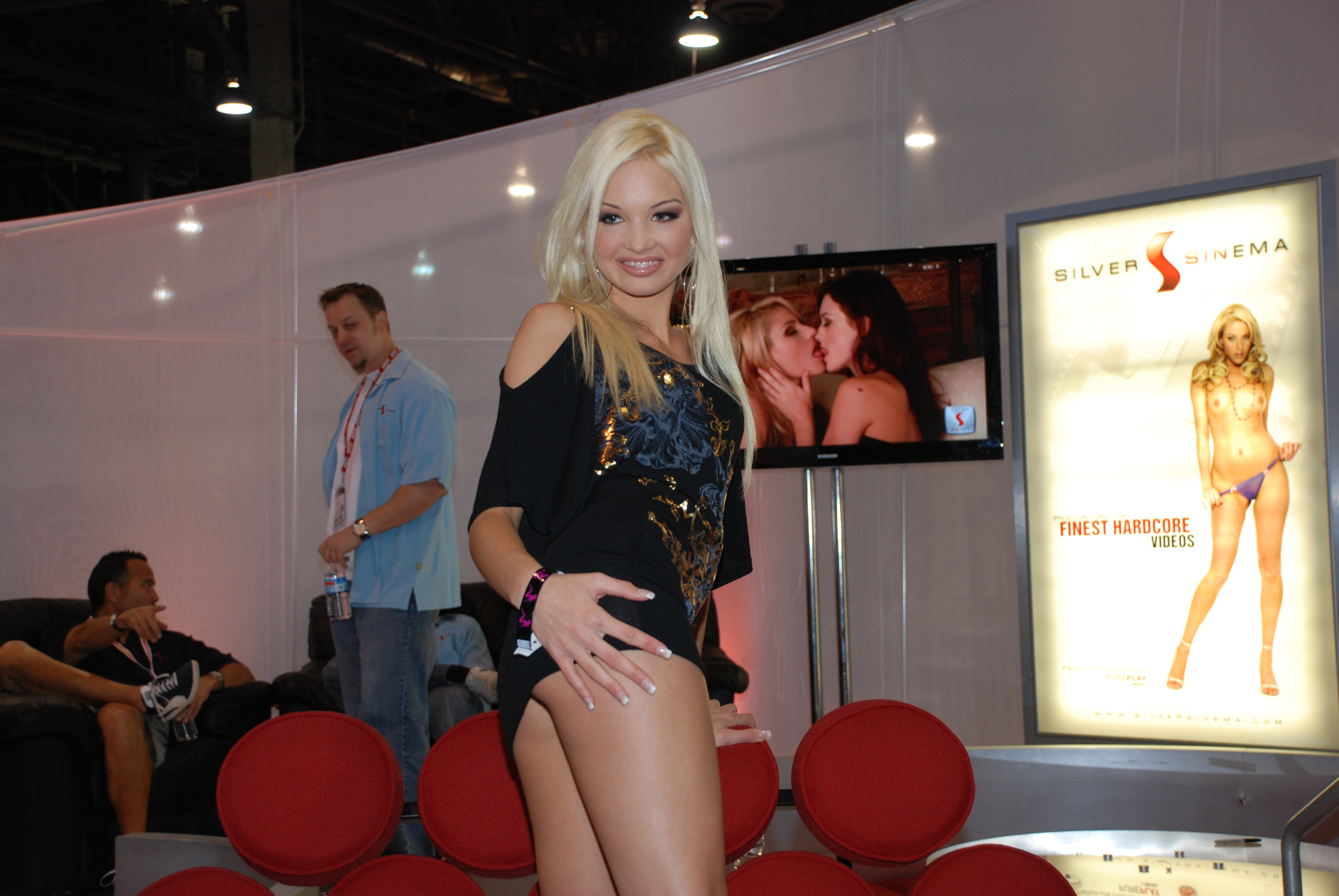 AEE2009_Jan11_Nikon 188